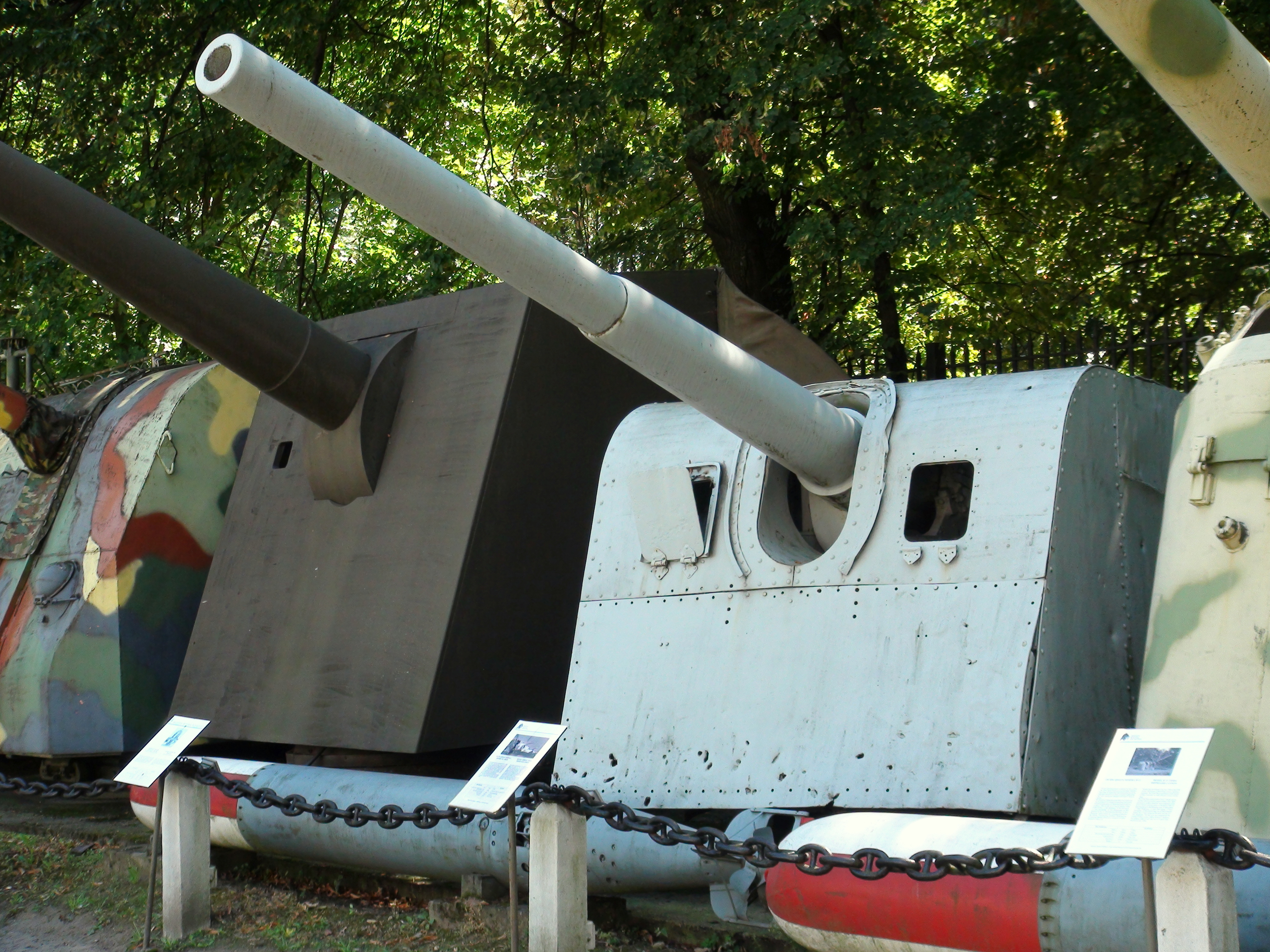 Pojedyncze działo 120 mm L/50 wz.36 Bofors eksponowane w Muzeum Wojska Polskiego w Warszawie